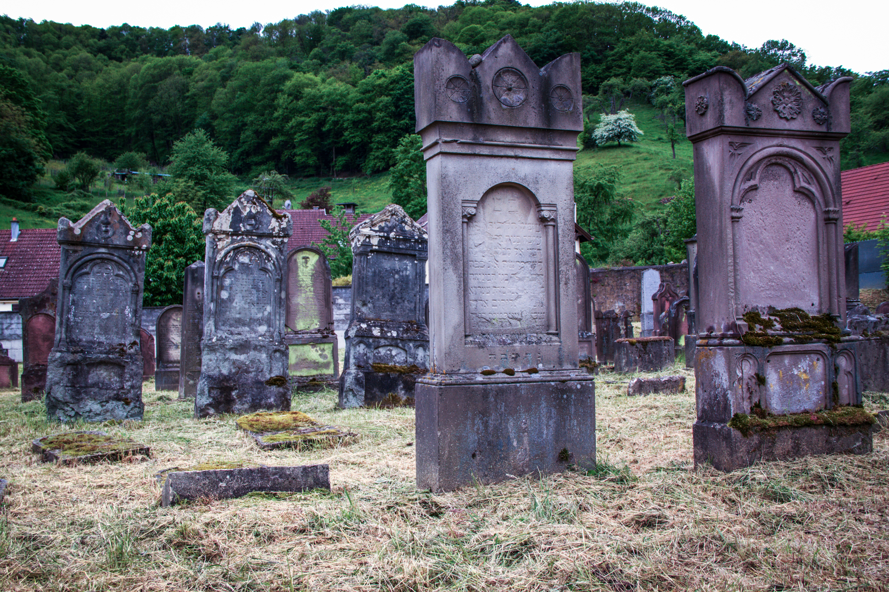 Le vieux cimetière juif de Thann